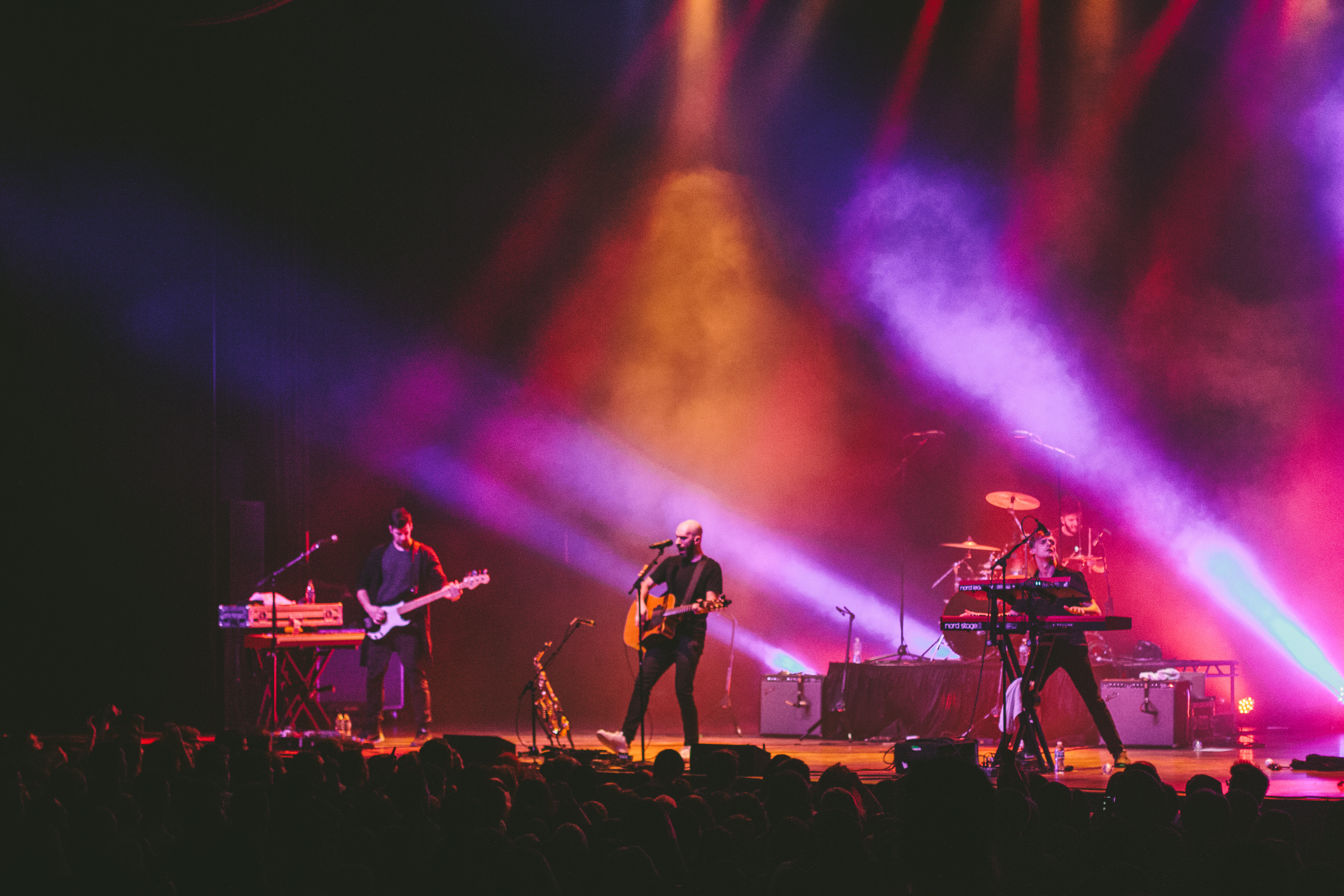 X_Ambassadors-3296